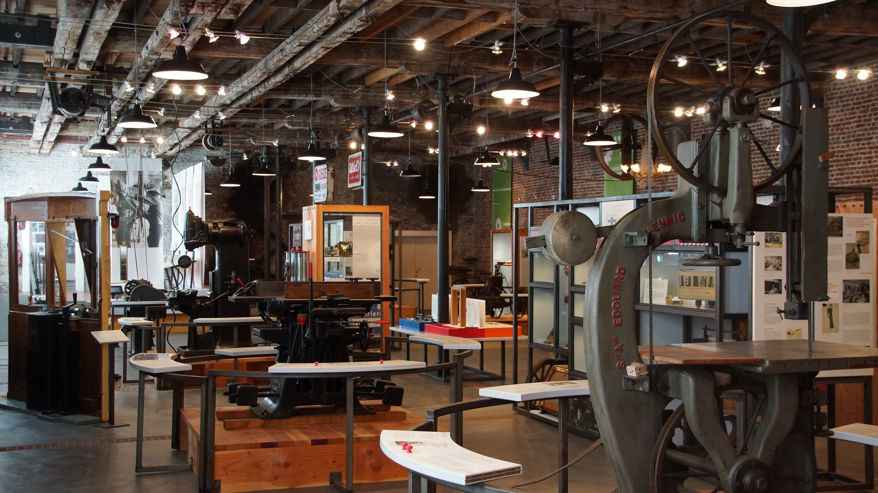 La Fonderie, Brussels Museum of Industry and Labour